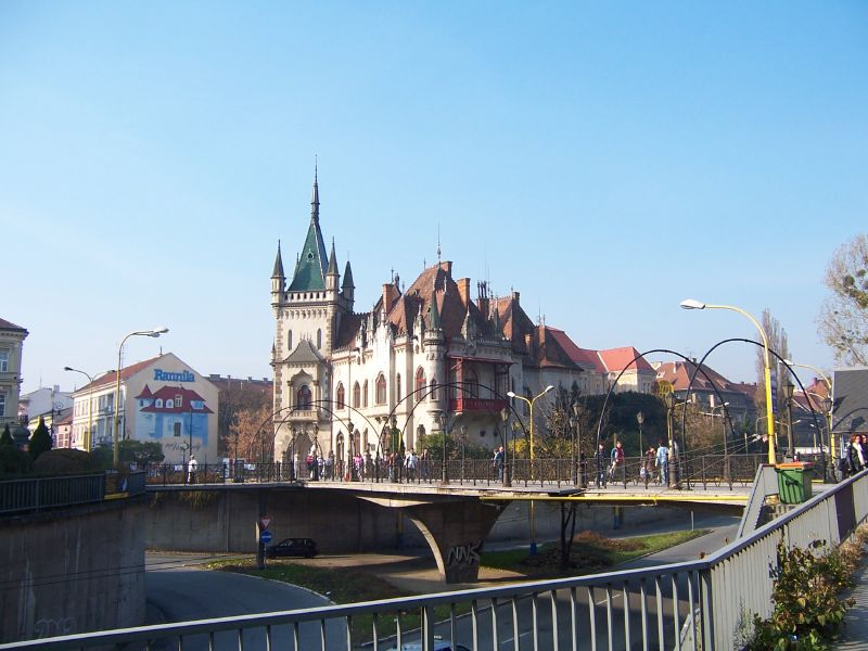 Jakabov palác